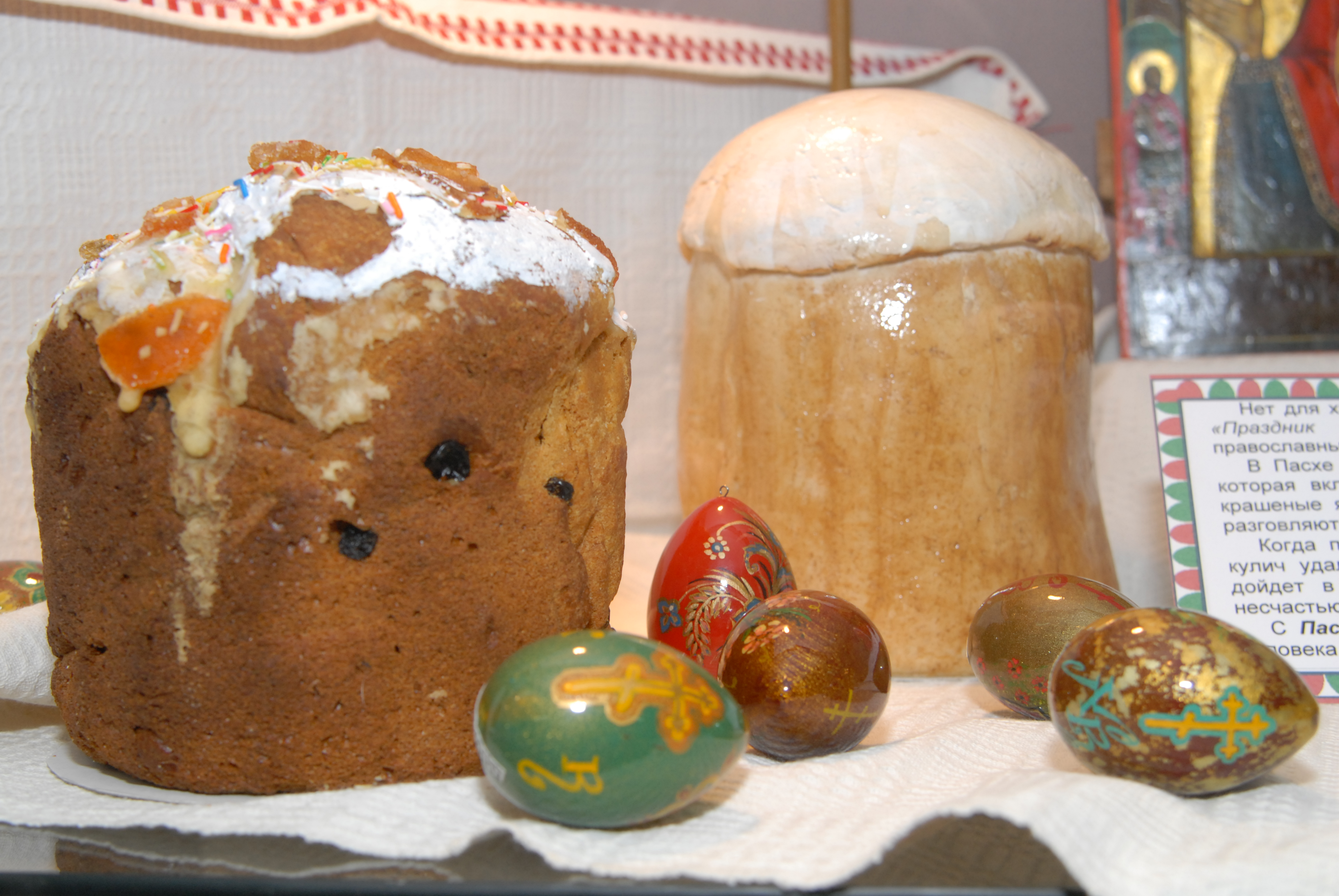 Куличи. Белгородский музей народной культуры.